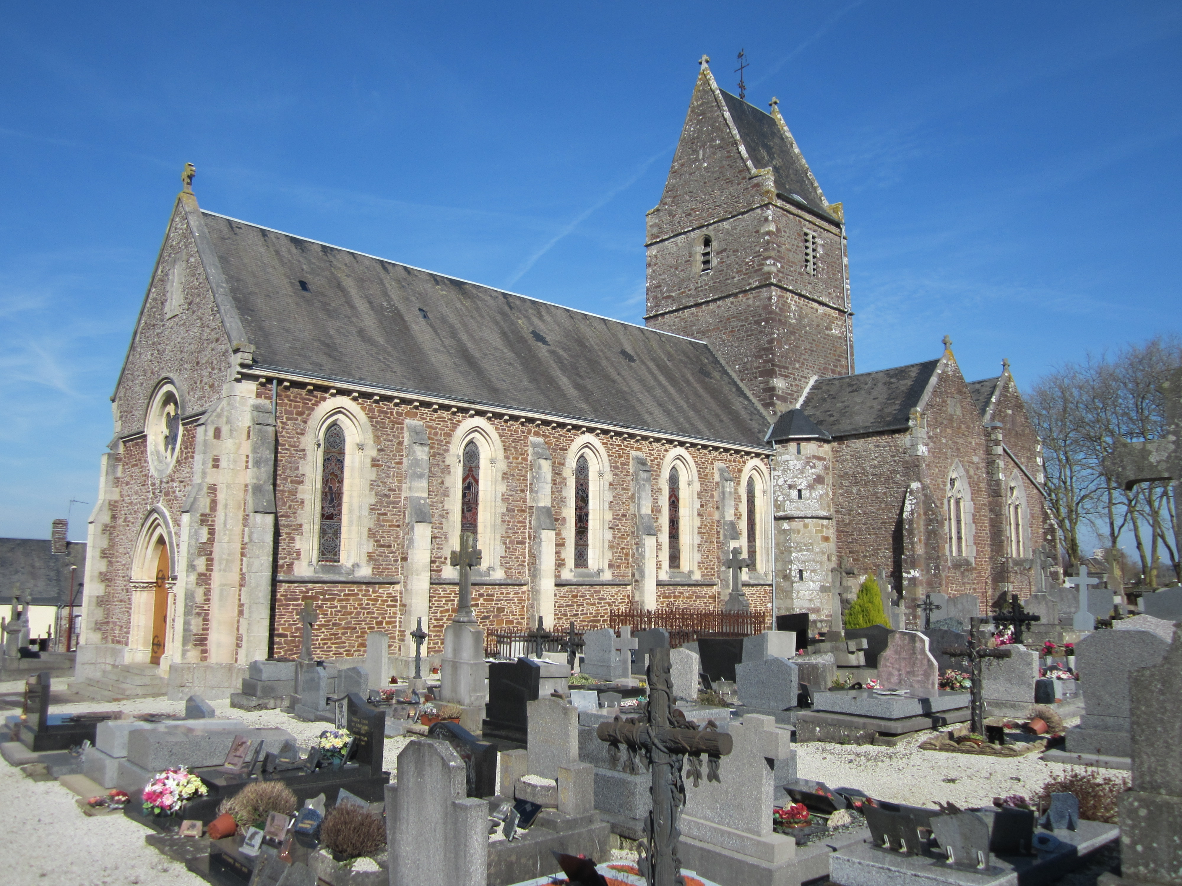 Ver, Manche